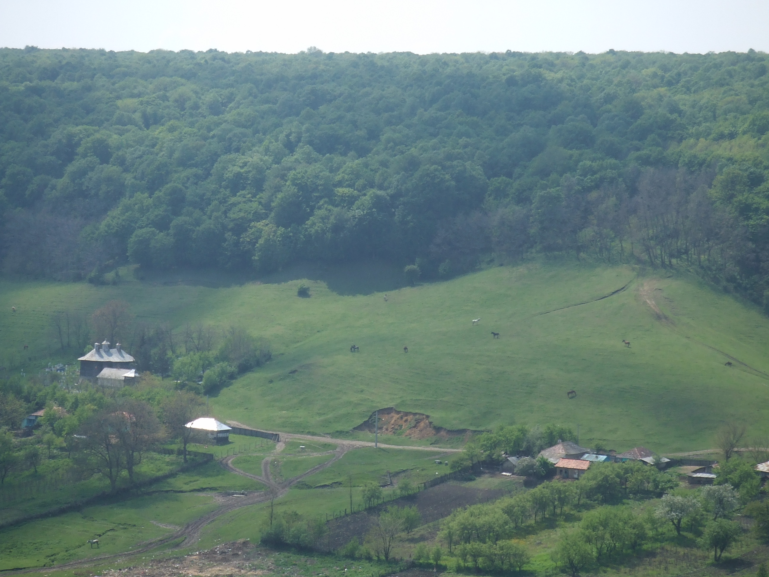 Căpușneni